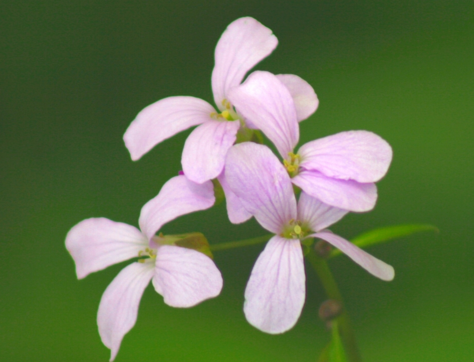 Cardamine_bulbifera (Dentaria Minore) Località : Melere, Trichiana (BL), 843 m s.l.m.